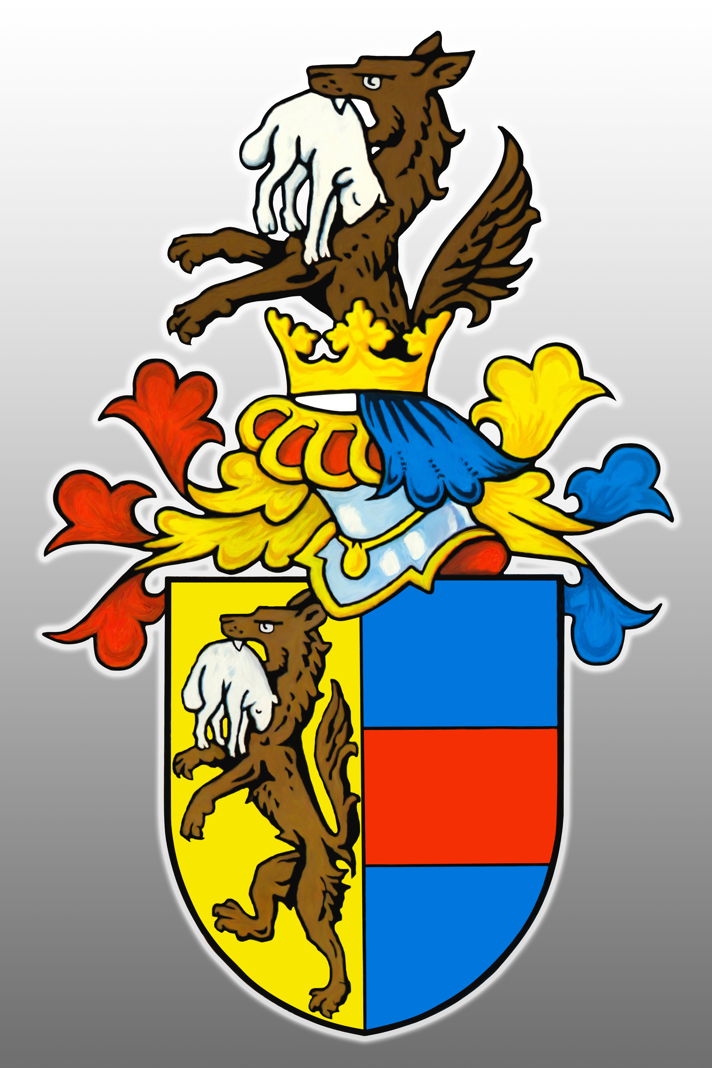 Rodový erb Vidršpergárové z Vidršpergu